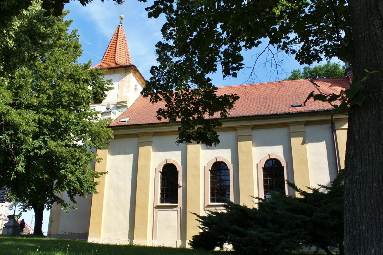 Stochov